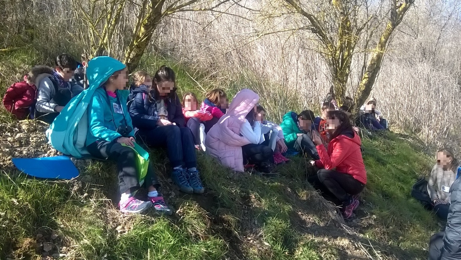 Actividad didáctica en escuela-bosque